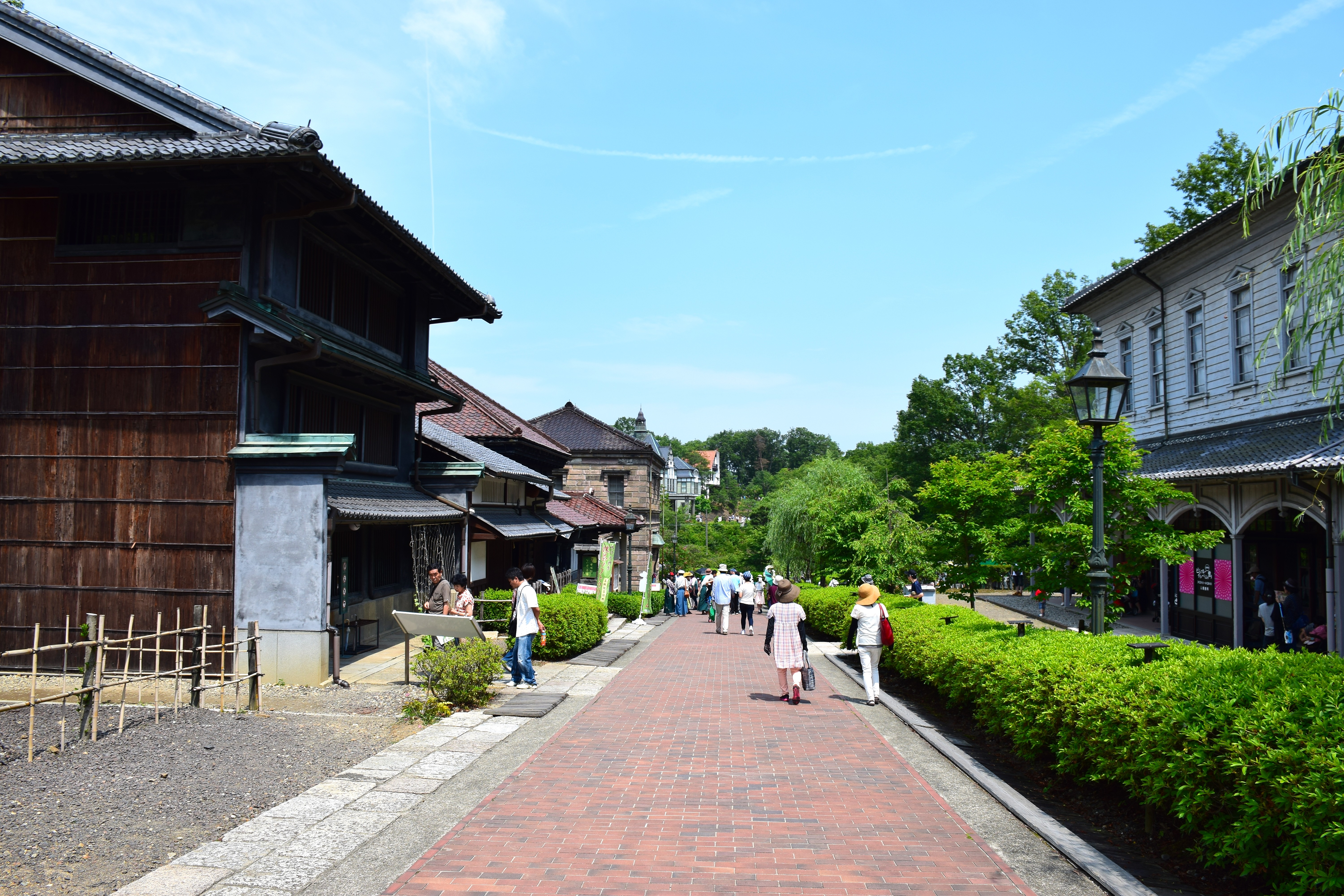 明治村風景